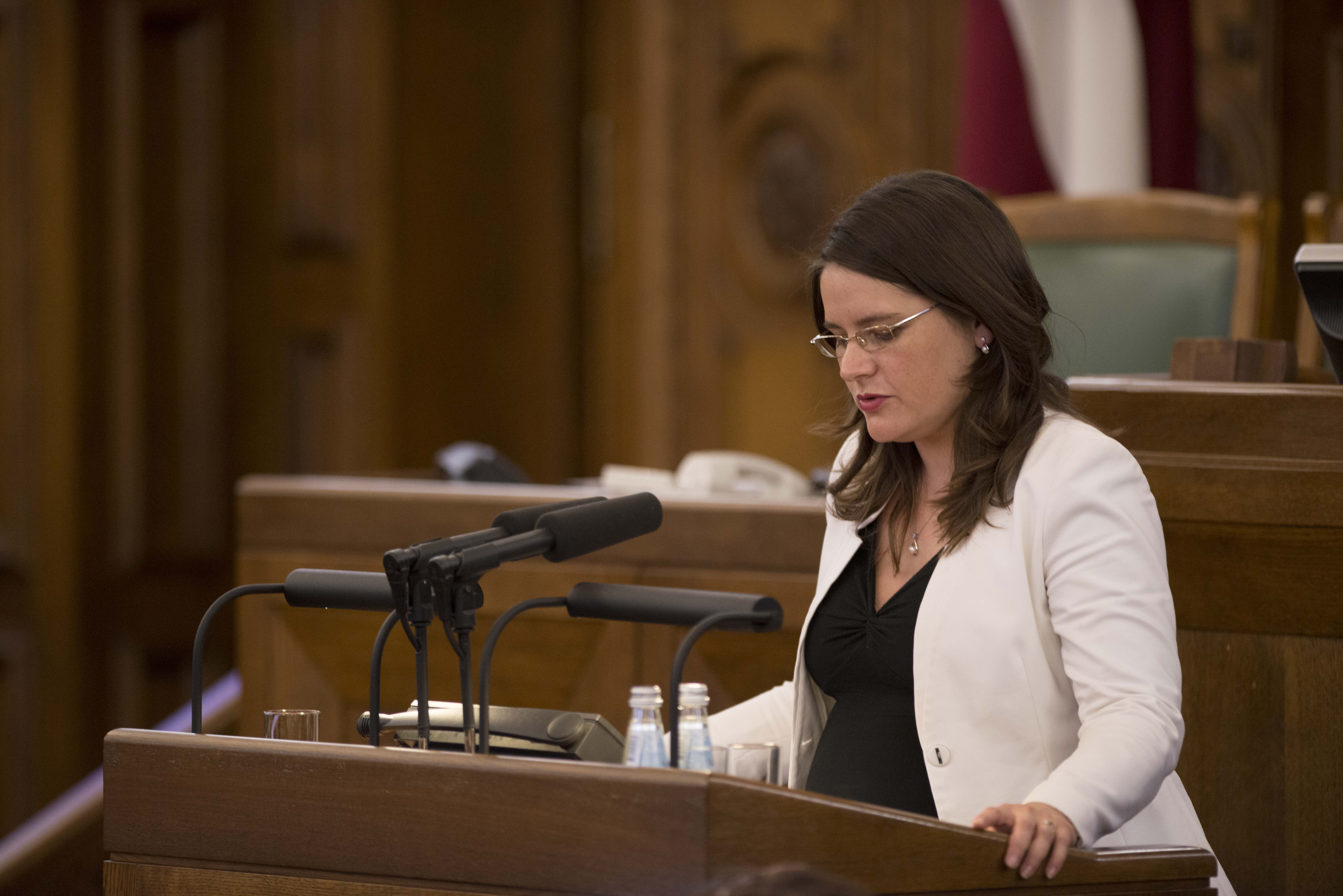 2014.gada 4.novembris. Deputāte Inga Bite dod svinīgo solījumu. Foto: Juris Vīgulis, Saeimas Kanceleja Izmantošanas noteikumi: saeima.lv/lv/autortiesibas